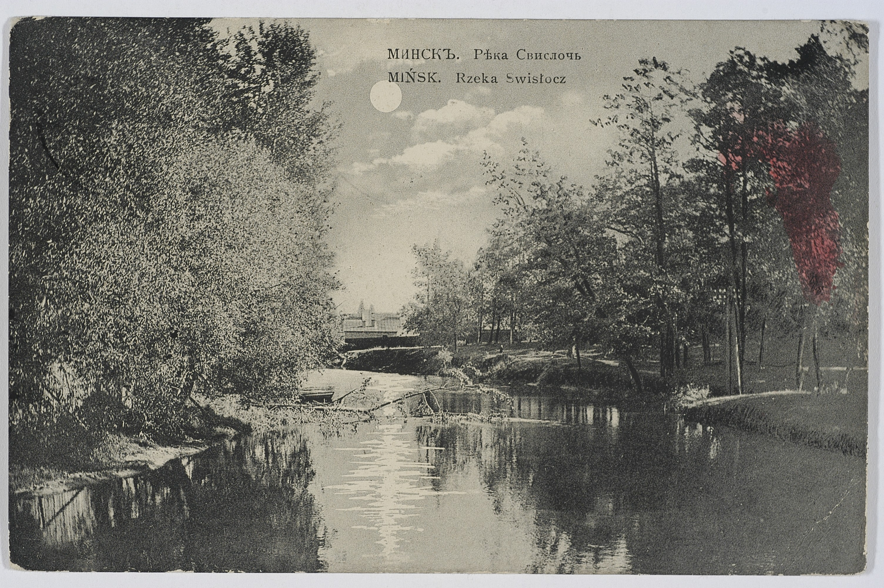 Беларуская (тарашкевіца): Менск (Miensk), рака Сьвіслач (Śvisłač)